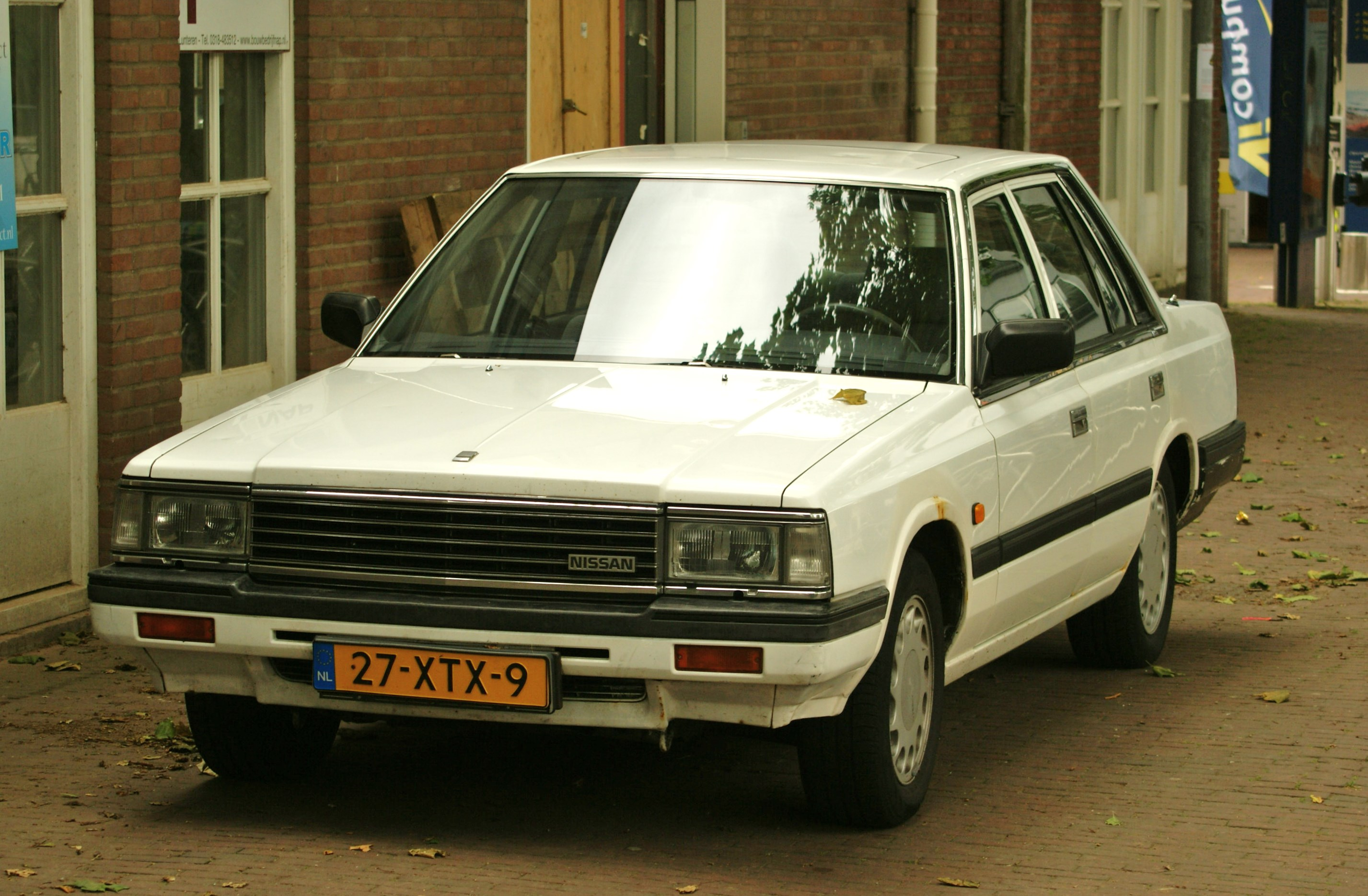 27-XTX-9